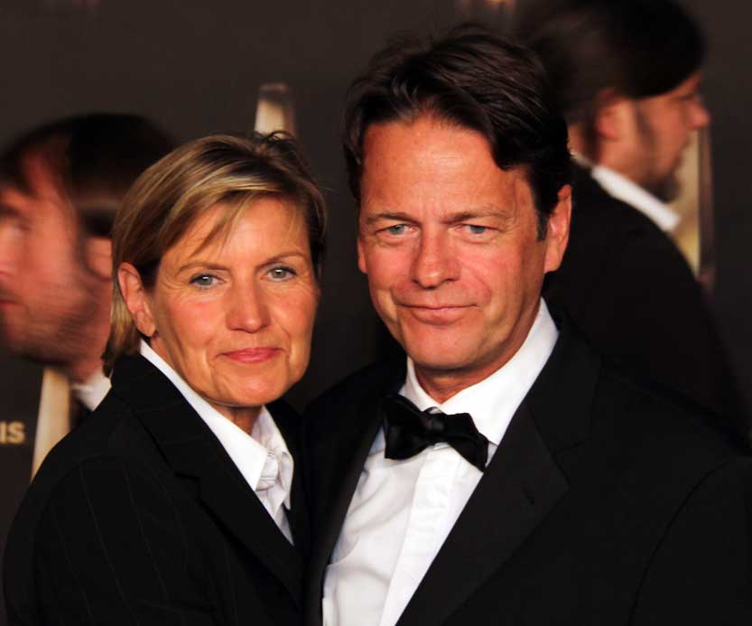 Rudi Cerne beim Deutschen Fernsehpreis 2012